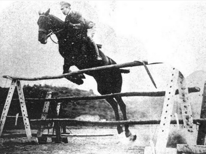 大障害 西